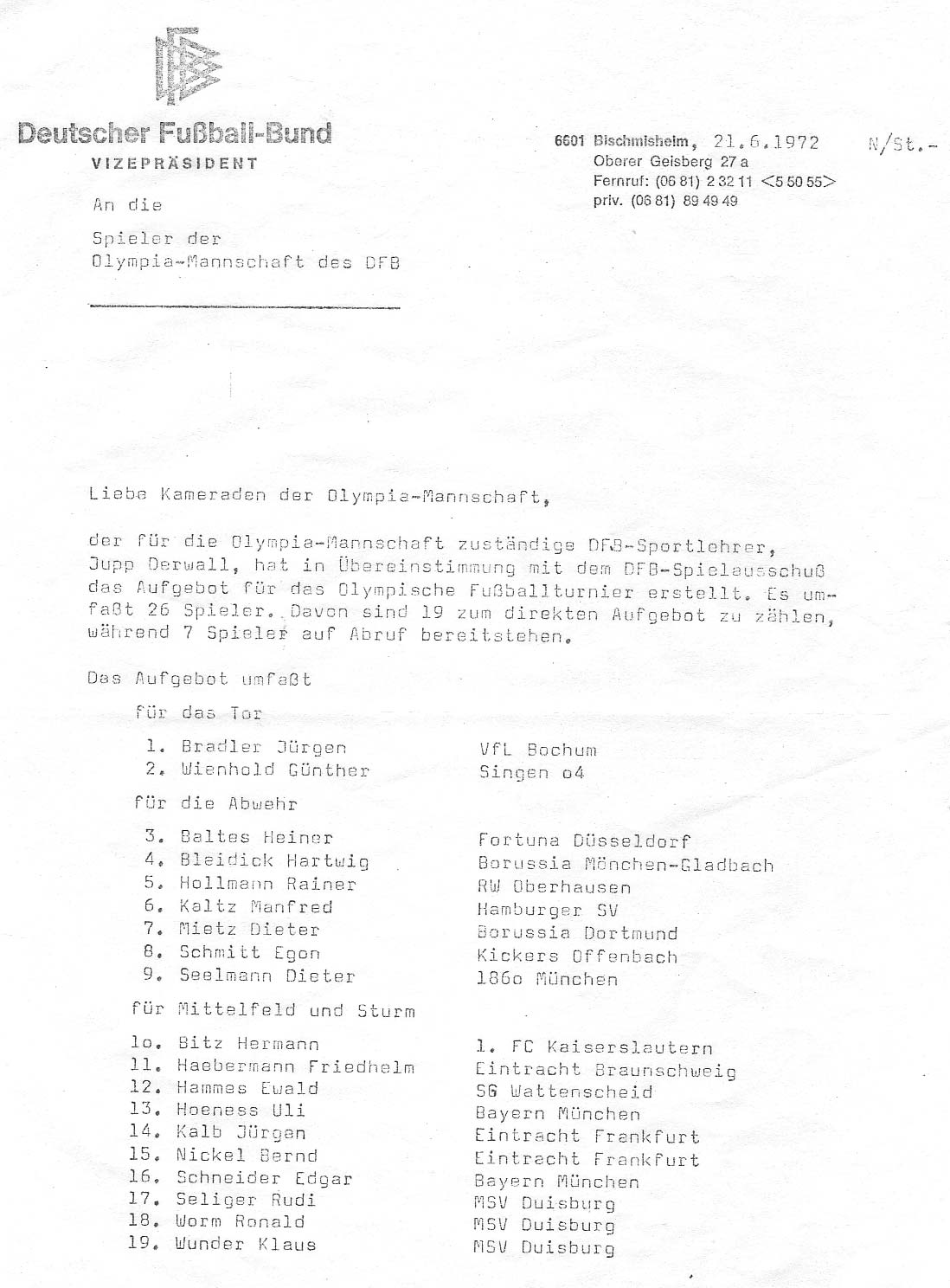 Berufung der Fußball-Olympiamannschaft des DFBs 1972.